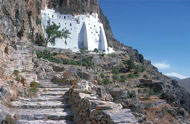 Kloster Panagía Chosowiótissa unterhalb des Profítis-Ilías-Gipfels auf Amorgós, Griechenland